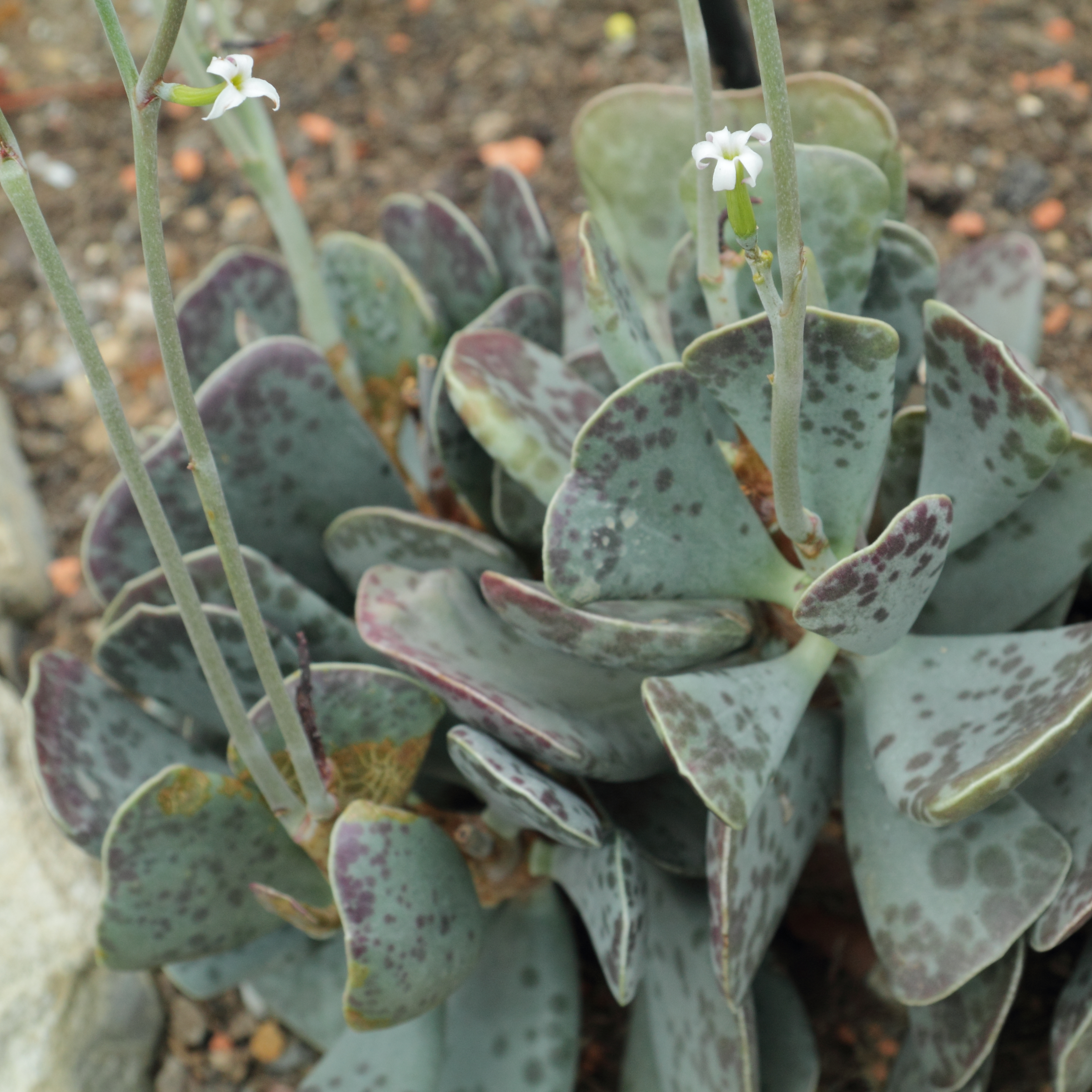 Adromischus triflorus, identifierad med hjälp av befintlig skylt vid Kew Gardens, London.